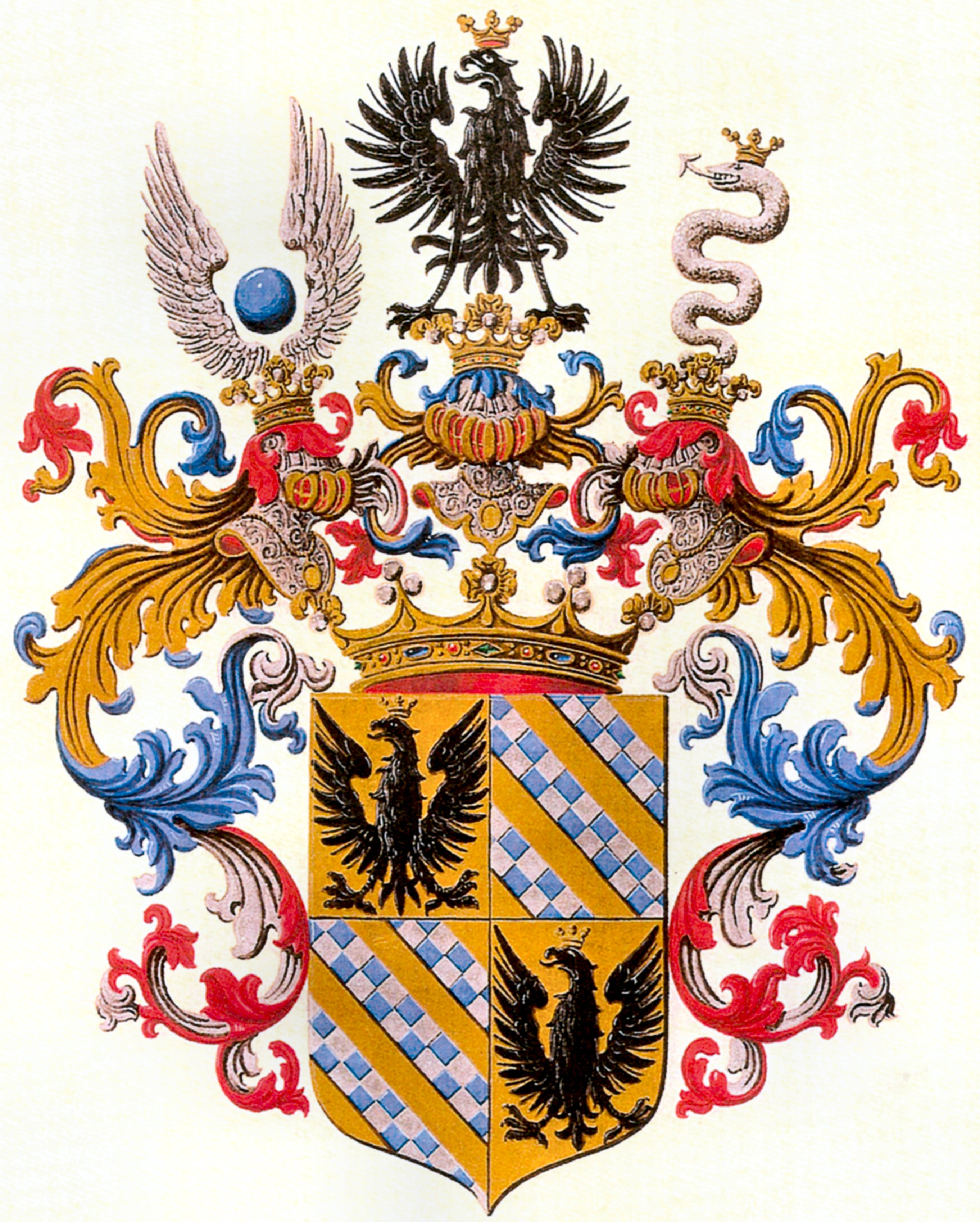 Wappen Marenzi 1932, italienisch, im Dekret des Königreichs Italien vom 2. Mai 1932